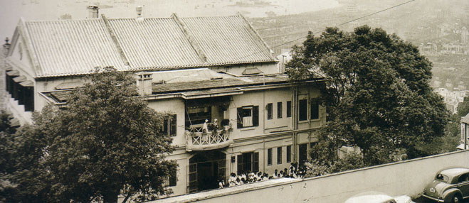 嘉諾撒聖方濟各書院在1869年的校舍